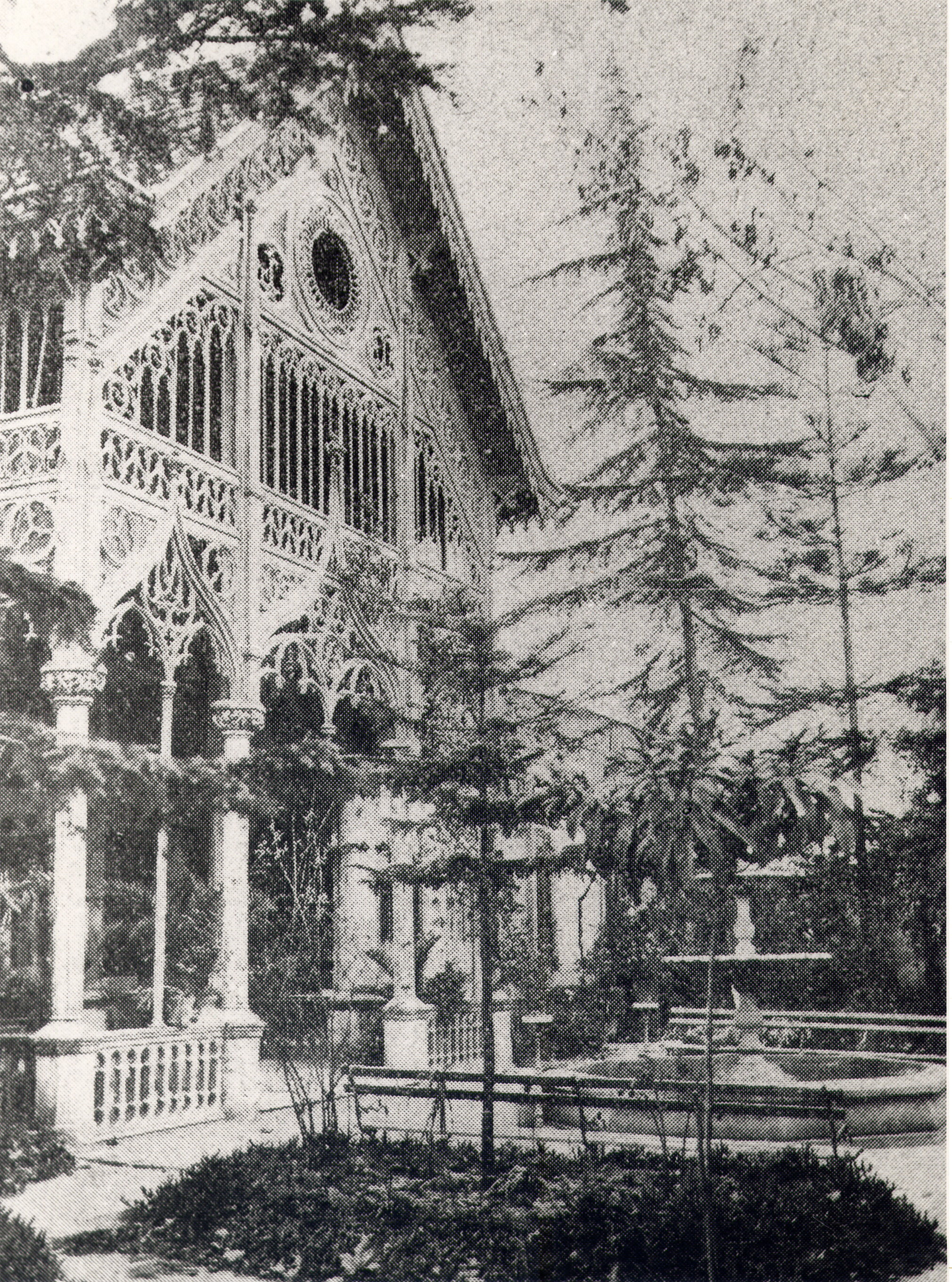 1897 Recreative Garden, pabellón central, en madera, club social. Obra de Anastasio Martínez Hernández, ubicada en Espinardo. Posteriormente fue sede de la fábrica de pimentón, y la primera sede de onda regional.